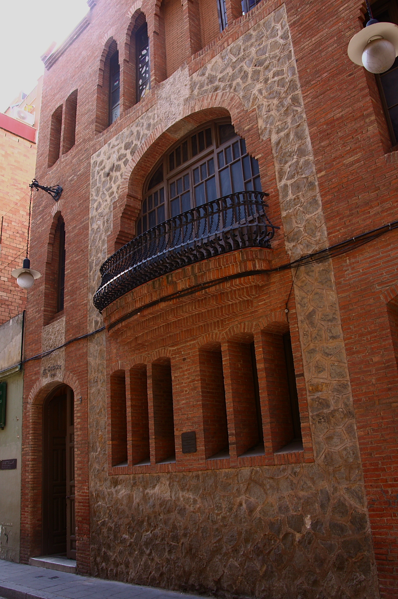 Centre Moral de Gràcia, obra modernista de Francesc d'Assís Berenguer i Mestres, construïda en 1912.